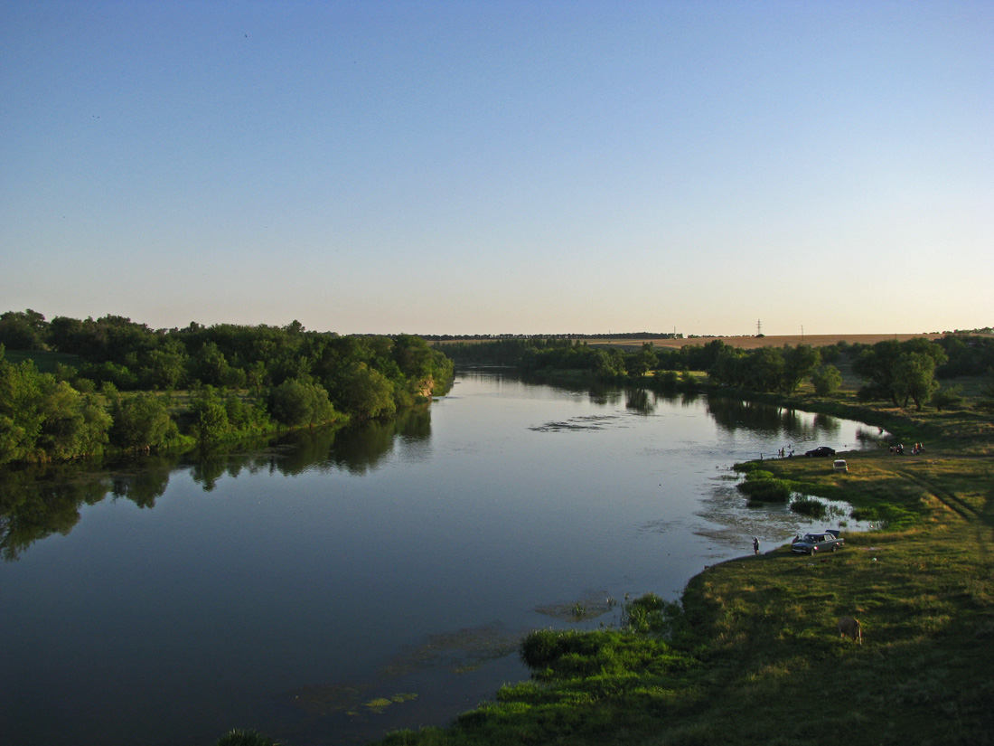 Село Долгая Пристань находится в Первомайском районе Николаевской области